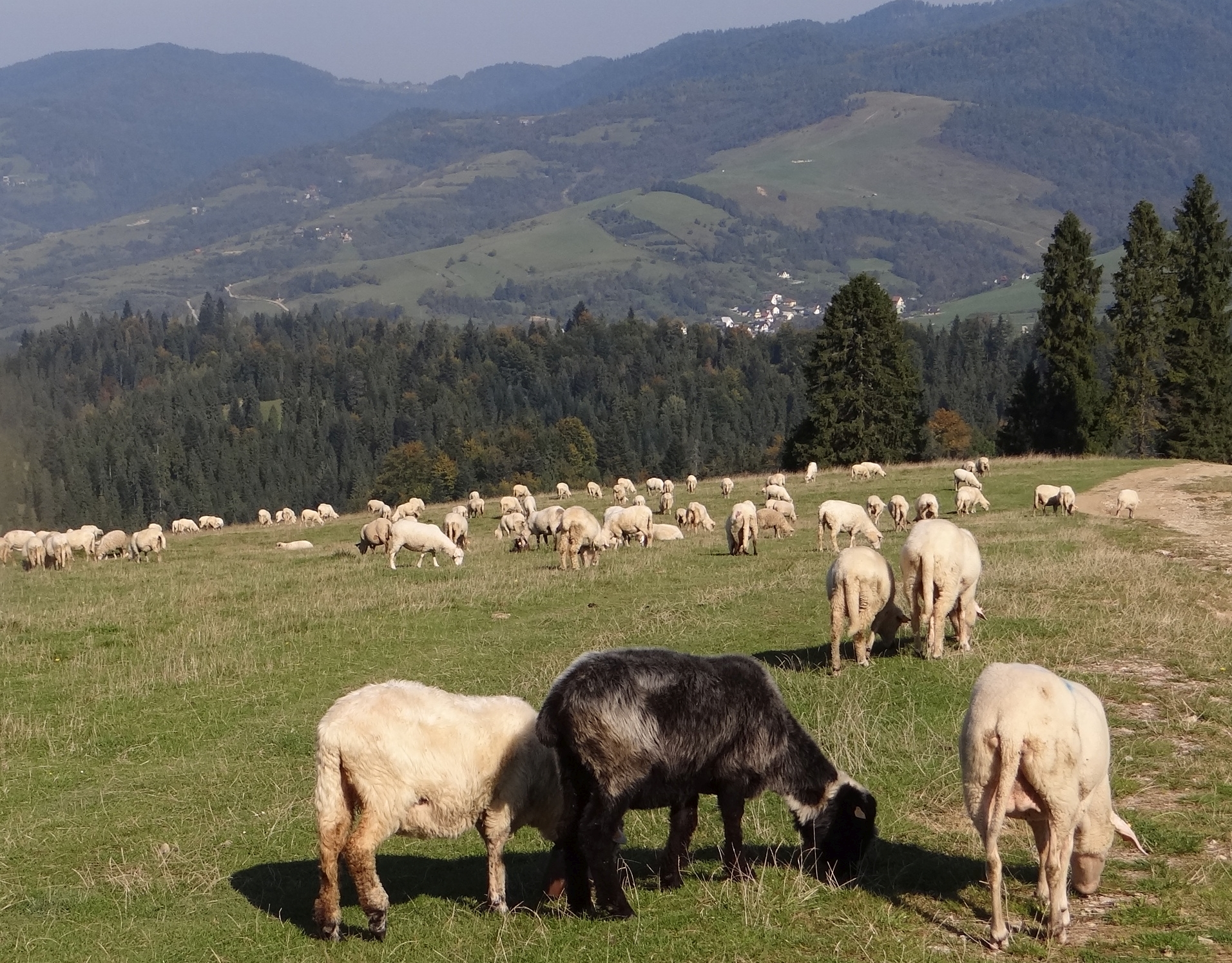 Wypas owiec w Pieninach (pod Durbaszką)